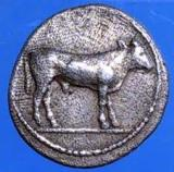 Тевтај